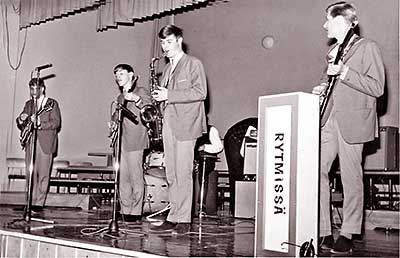 The Steeples vuonna 1964